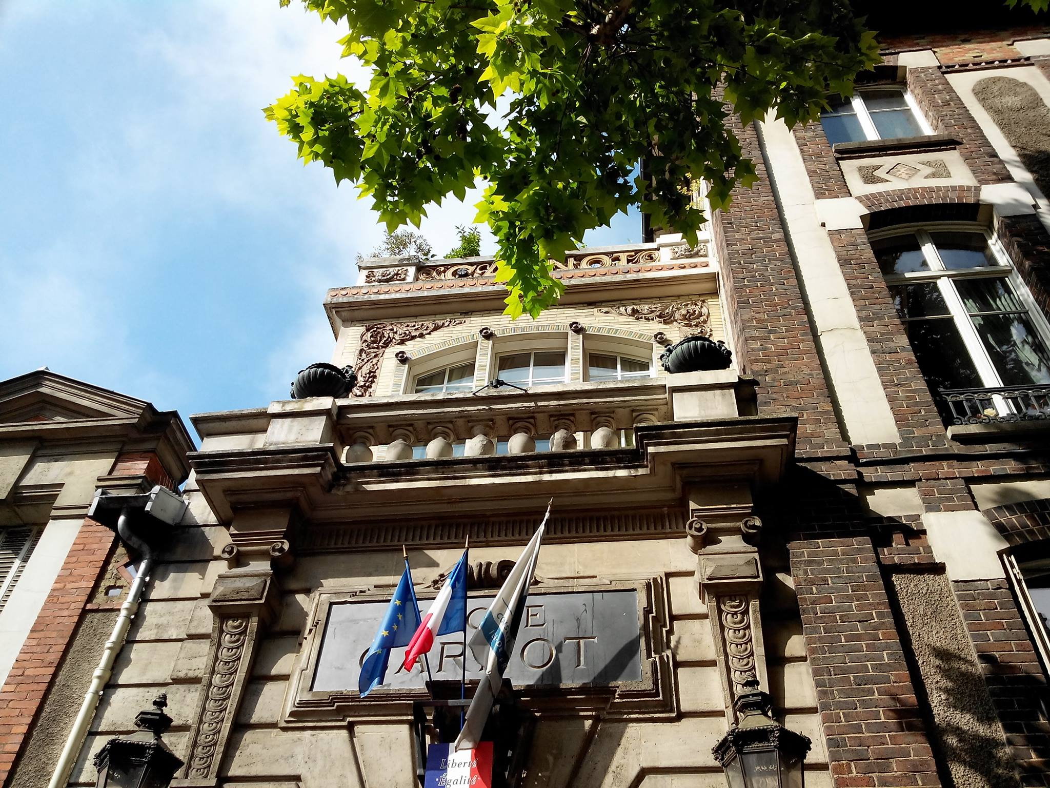 entrée et balcon du proviseur